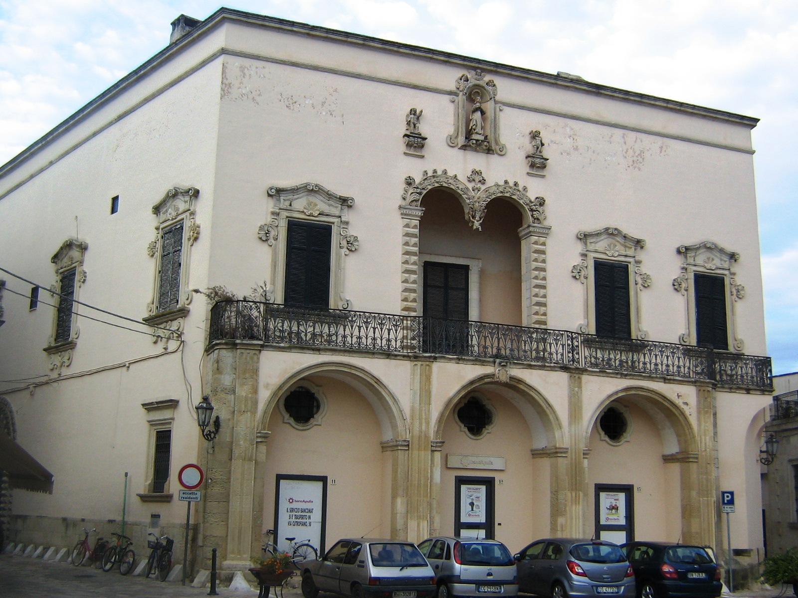 Palazzo Comi Corigliano d'Otranto